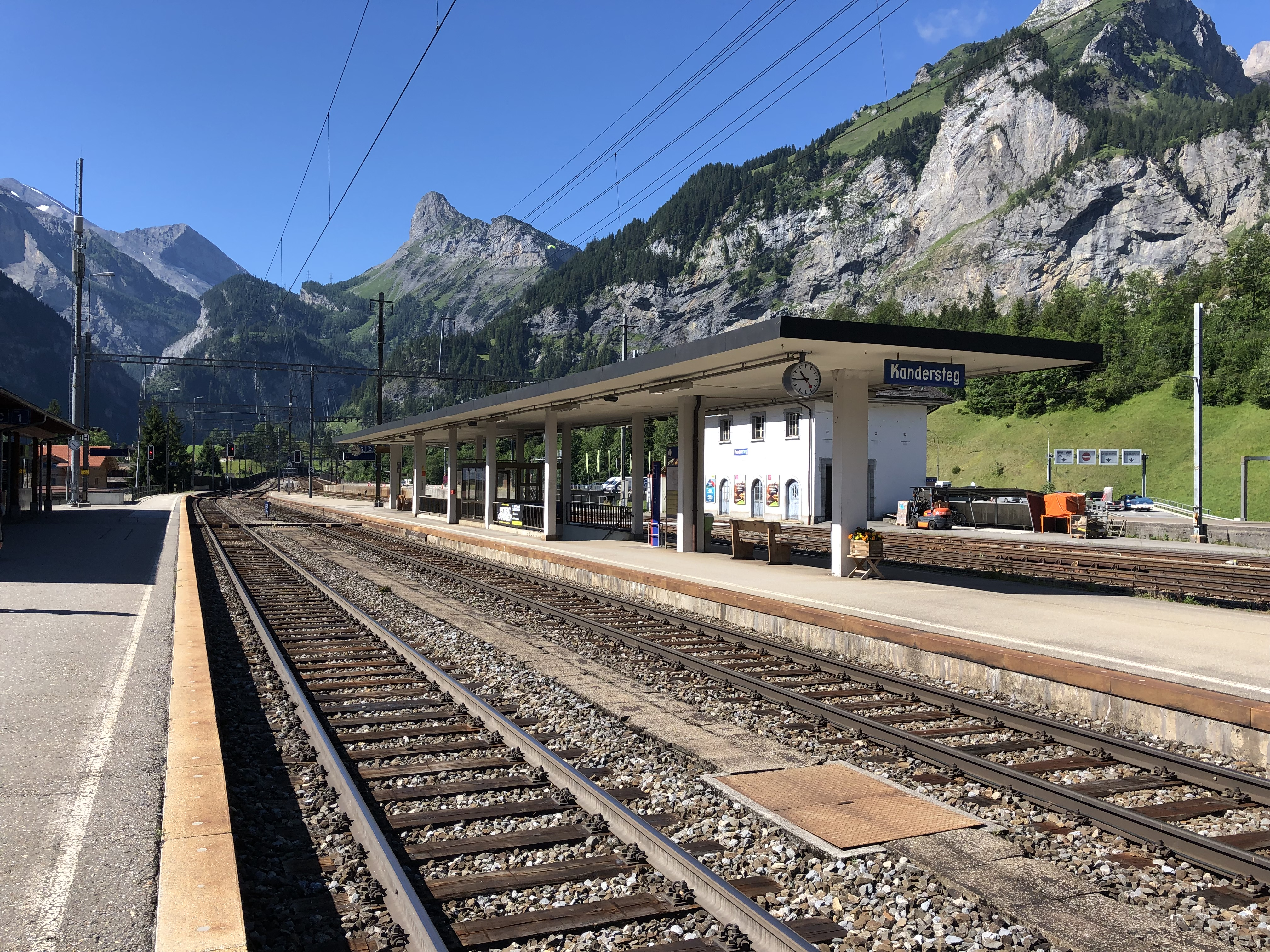 Kandersteg, August 2019, Bahnhof